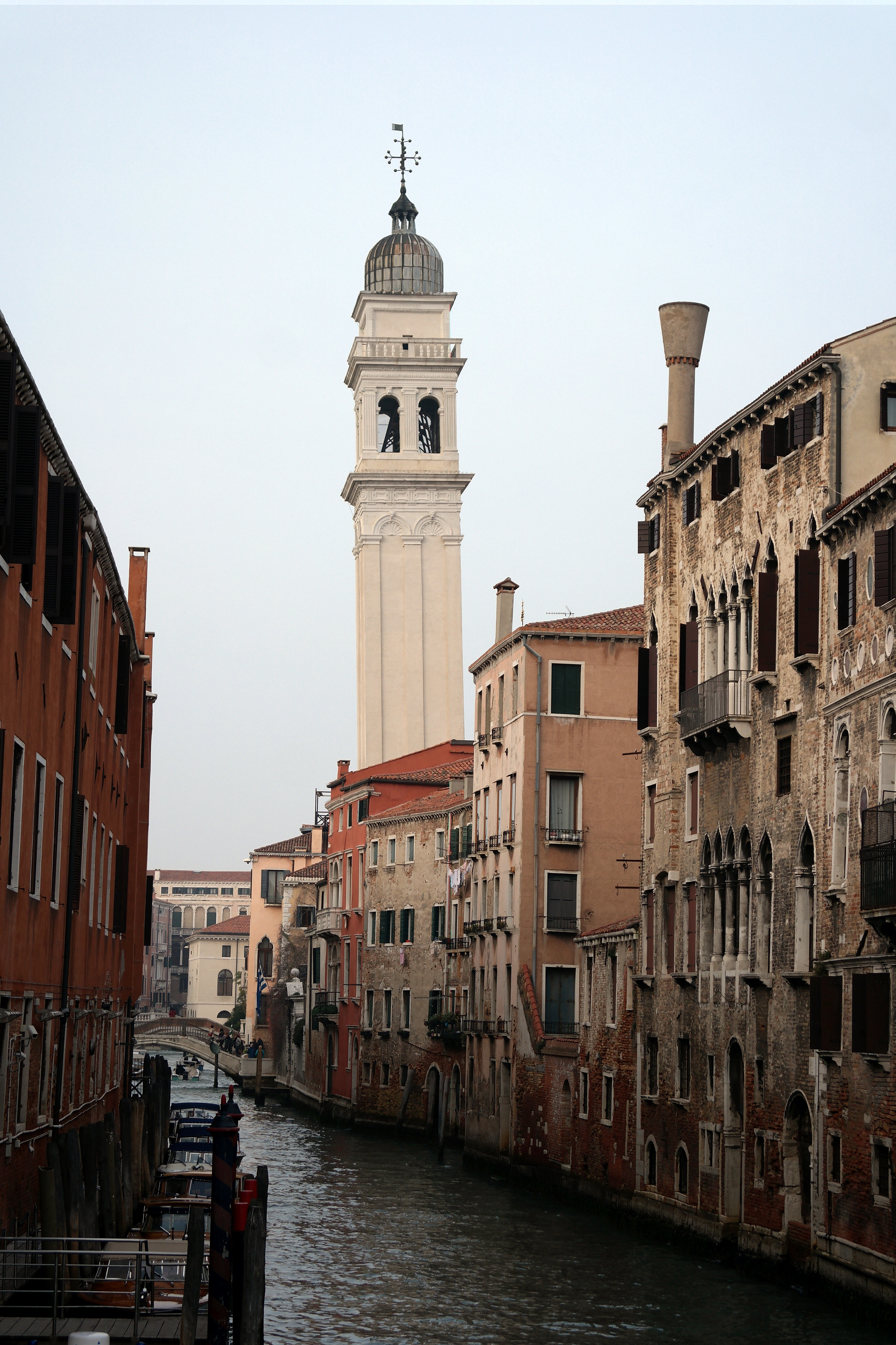 Rio dei Greci e campanile della Chiesa di Giorgio dei Greci